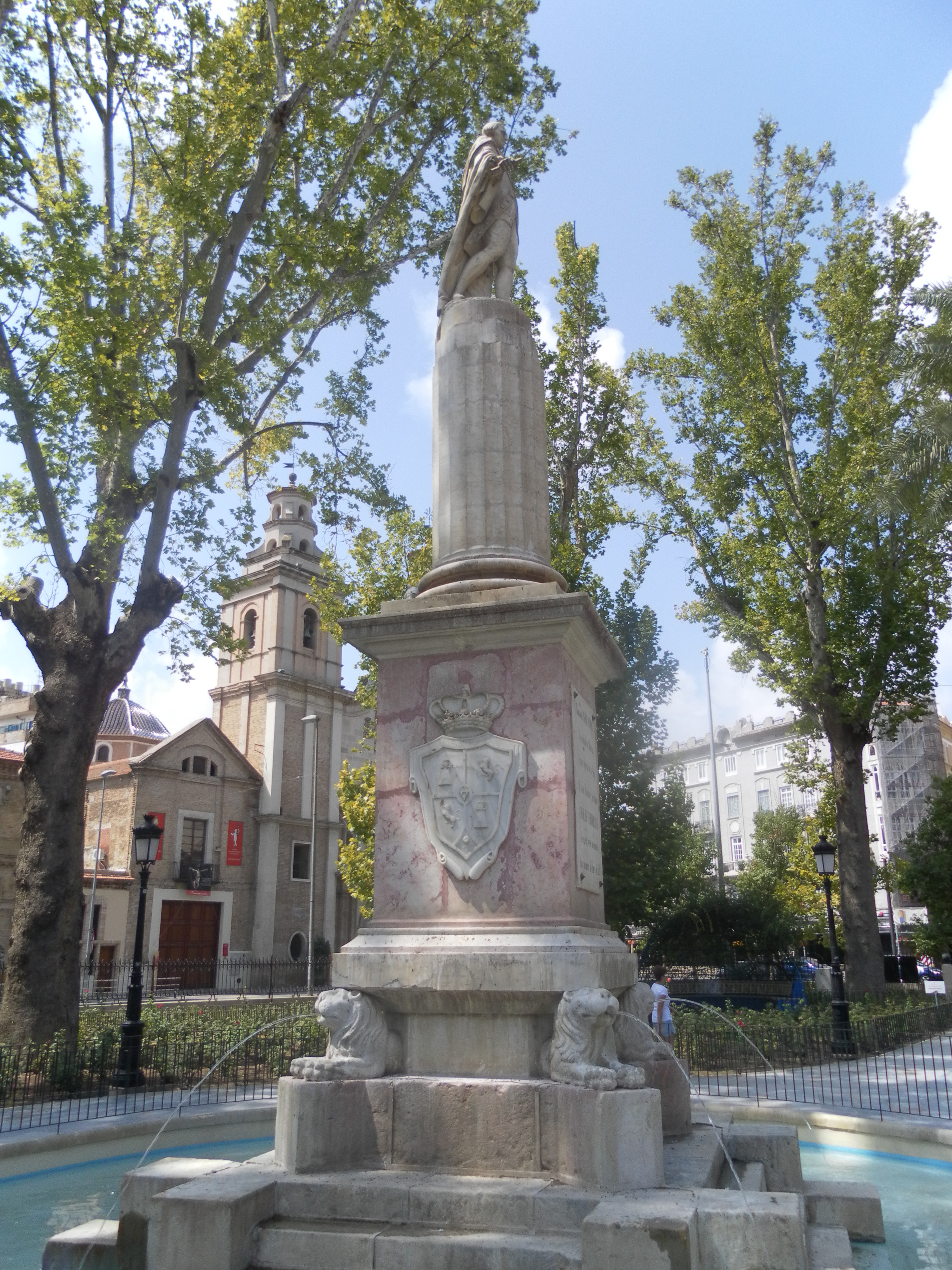 Monumento al Conde de Floridablanca, situado en el Jardín del mismo nombre de la ciudad de Murcia (Región de Murcia, España). Mediados del siglo XIX.